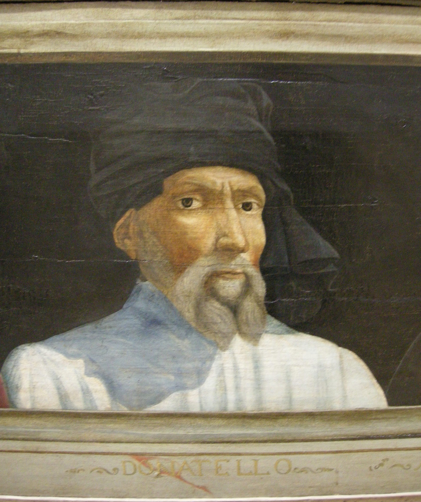 Cinque maestri del rinascimento fiorentino, XVI sec, donatello.JPG